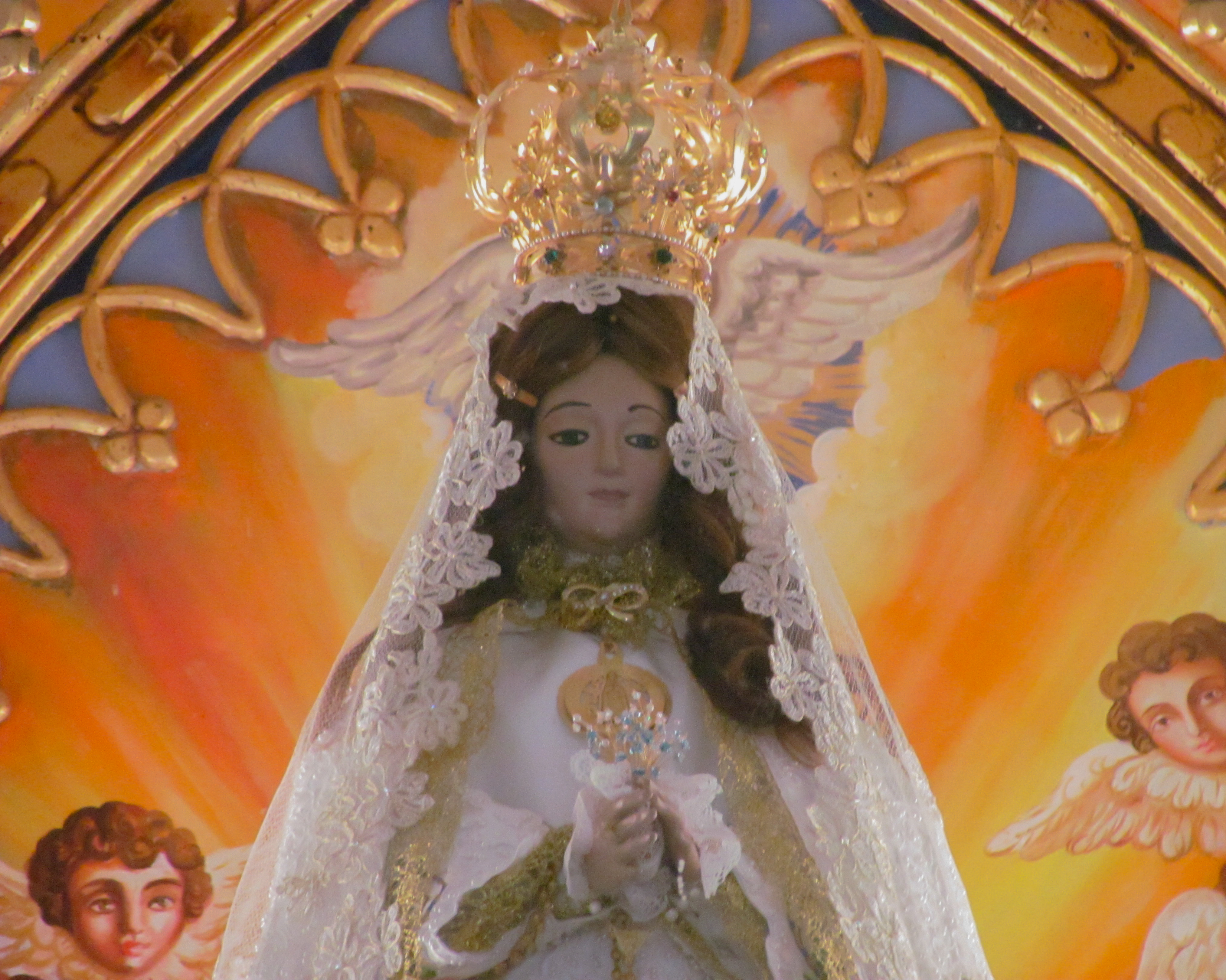 Virgen del Valle, Isla de Margarita, Venezuela